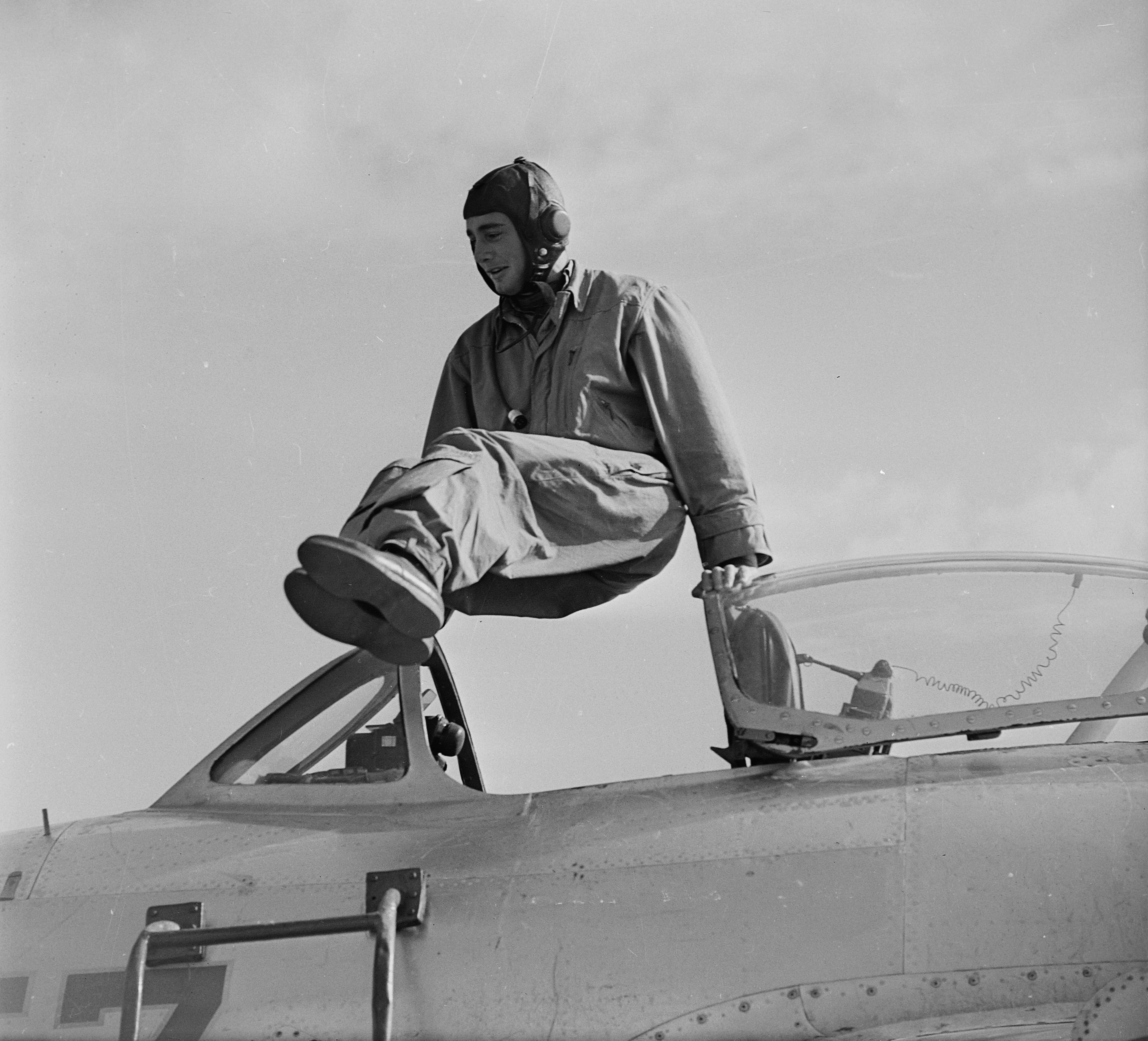 MiG-15-ös típusú vadászrepülőgép. Location: Hungary, Szolnok Tags: fighter;plane, military, airplane, pilot, transport, Hungarian air force, Soviet brand Title: MiG-15-ös típusú vadászrepülőgép.